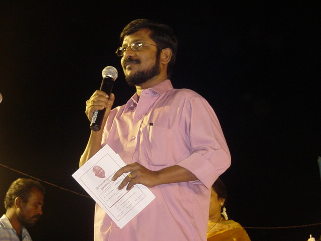 திரைப்படப் பாடலாசிரியரும் கவிஞருமாகிய பழநிபாரதி